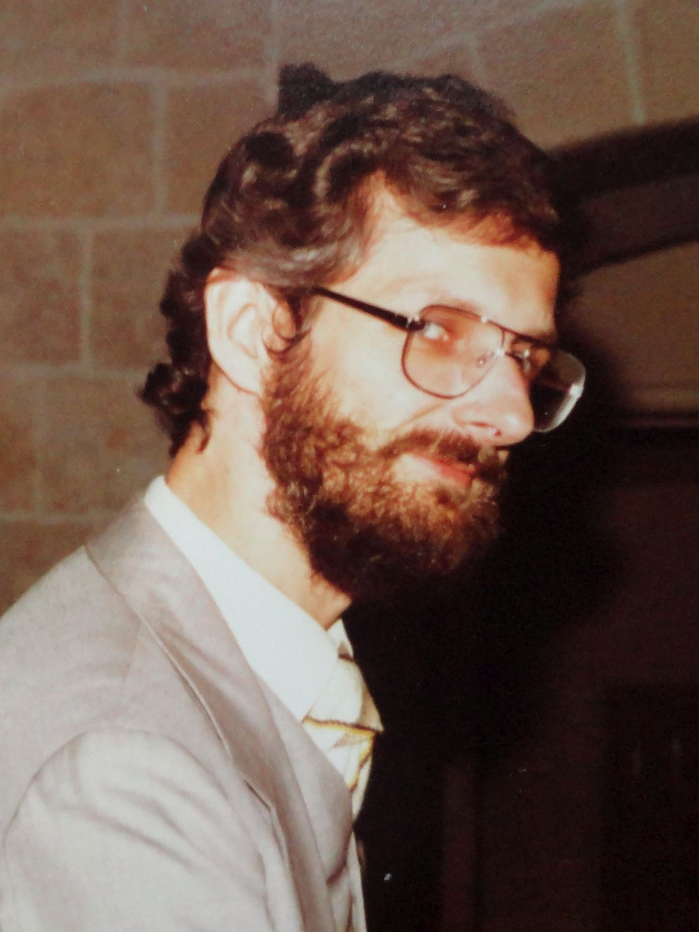 Hermann van Riemsdijk, Schacholympiade 1980 in Valletta auf Malta.